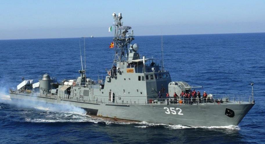 Corvette algérienne al-chihab